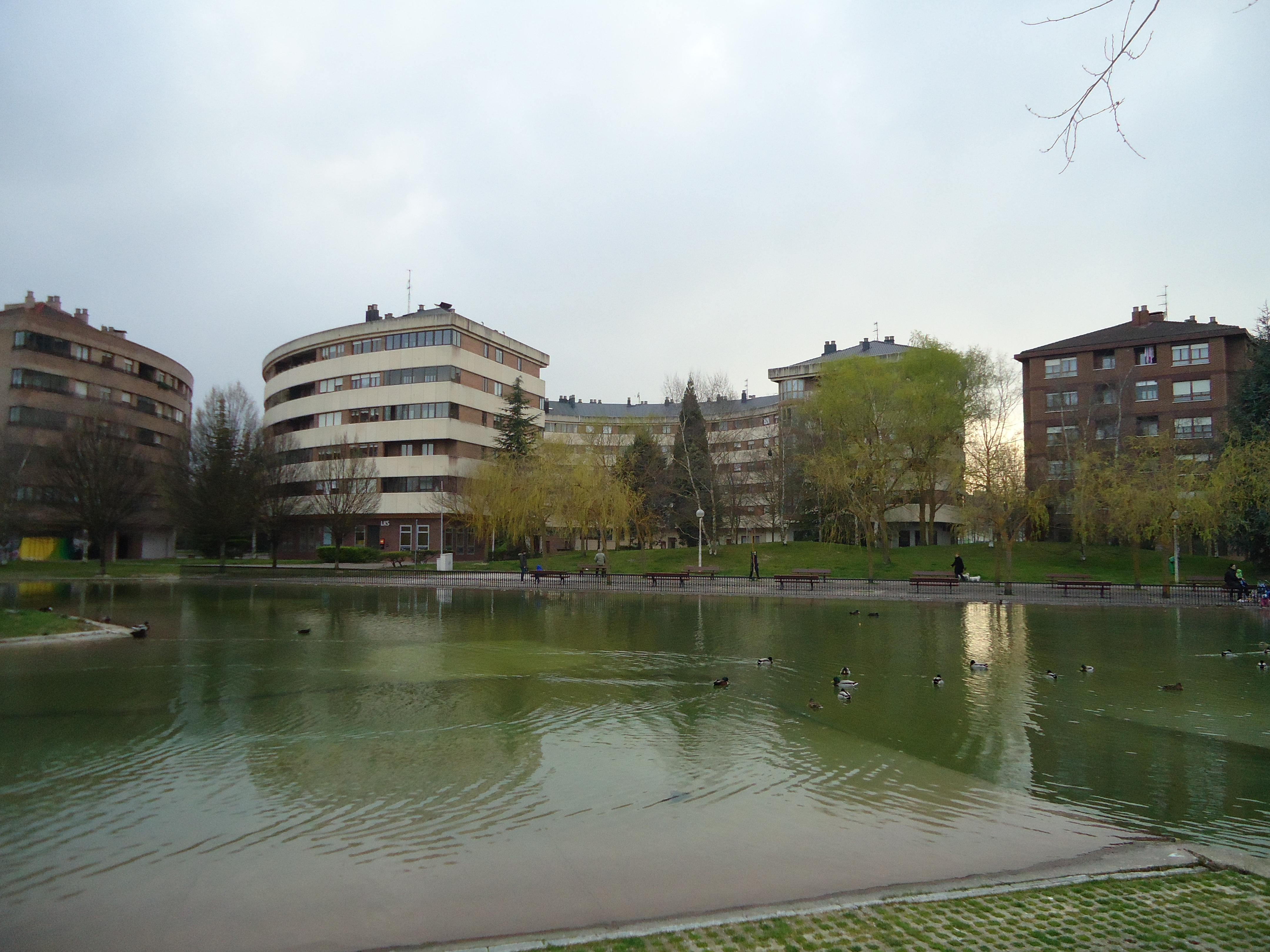 San Martin auzoa (Gasteiz)